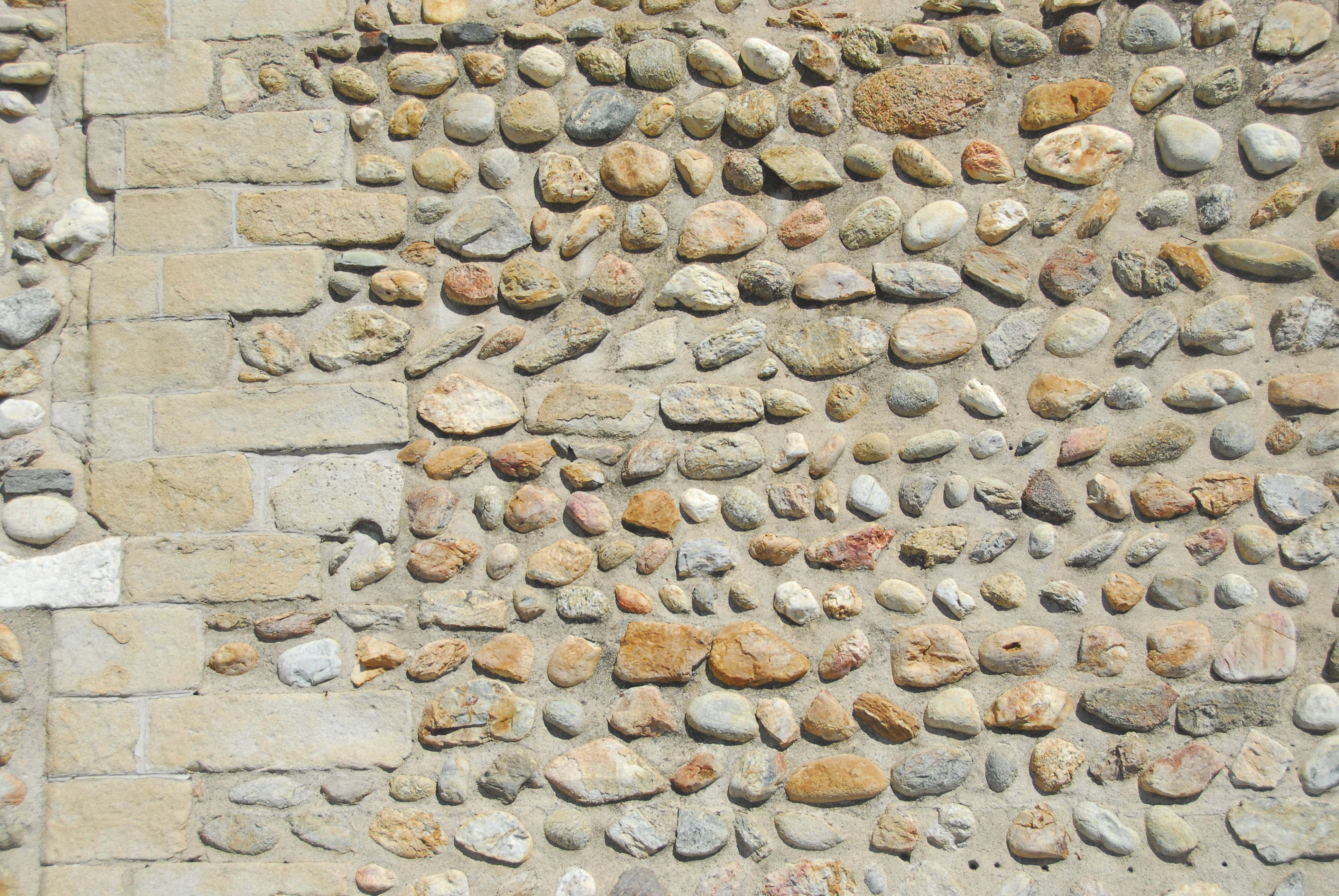 Ste-Eulalie-et-Ste-Julie_d’Elne, Südseite Natursteinverband